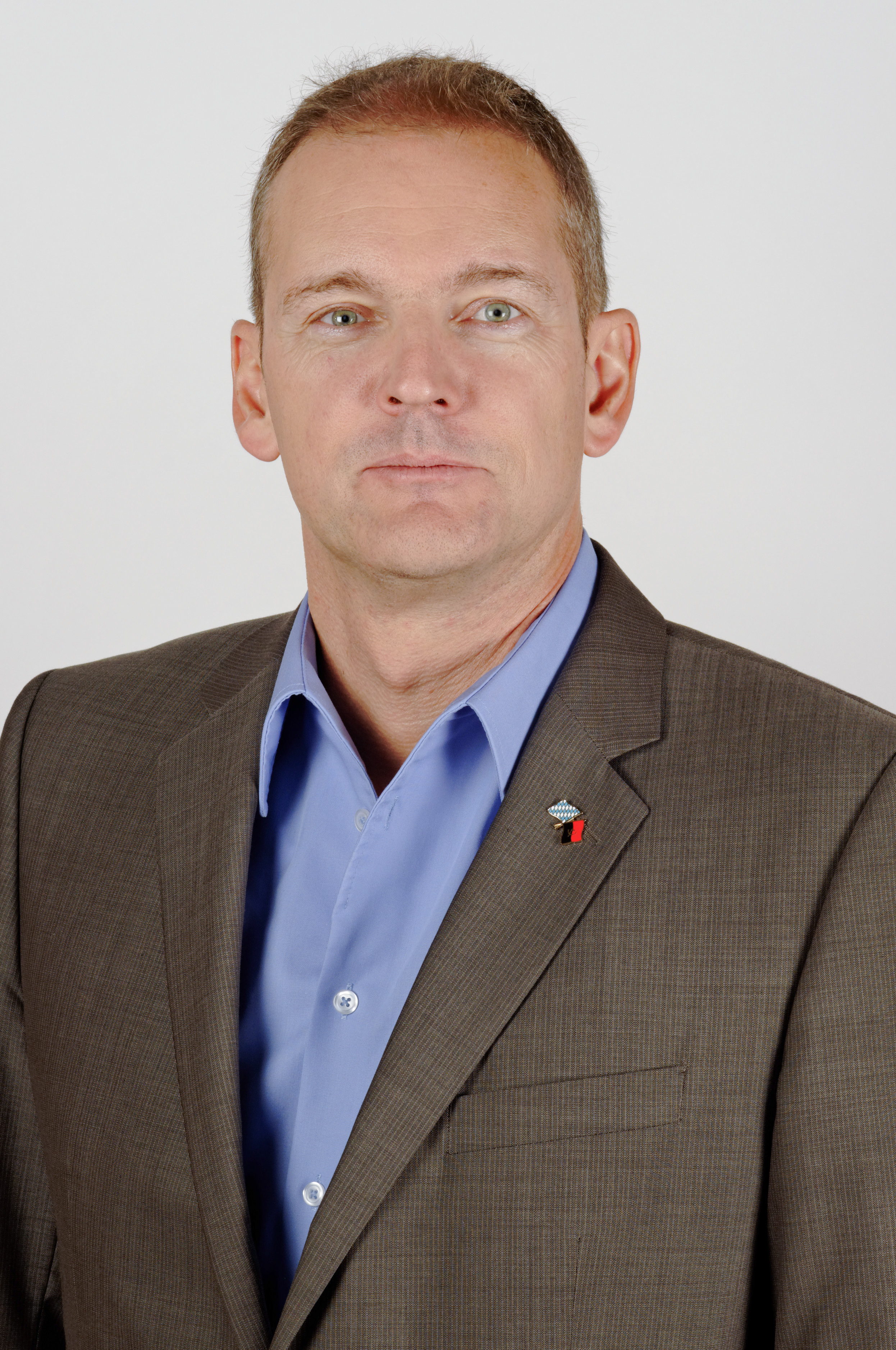 Landtagsprojekt Bayern